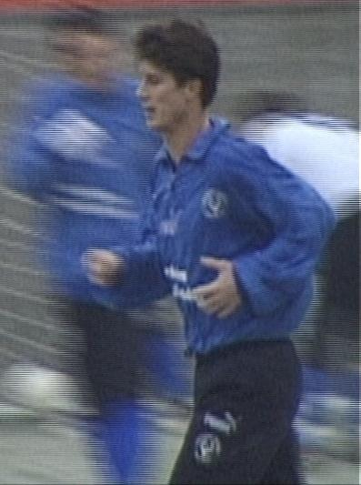 Brian Laudrup. Træningskamp i Topdanmark-hallen. 2002 ©2002 Hans Jørn Storgaard Andersen